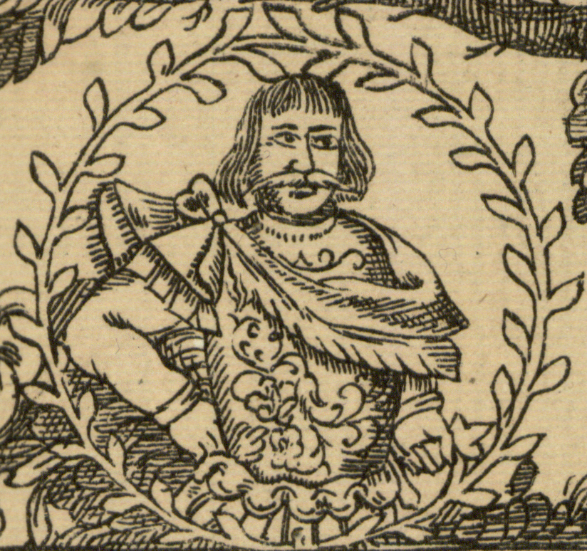 "Drzewo genealogiczne rodów: Tarnowskich, Melsztyńskich i Jarosławskich", fragment z podobizną Spytka III Melsztyńskiego (1398-1439). Augustinus Thille (miedzioryt 1644), tekst Albert Kazimierz Jastrzębski vel Albert Casimirus Jastrzębski; przedruk Adam Piliński (homeografia wg miedziorytu, Paryż, 1872)